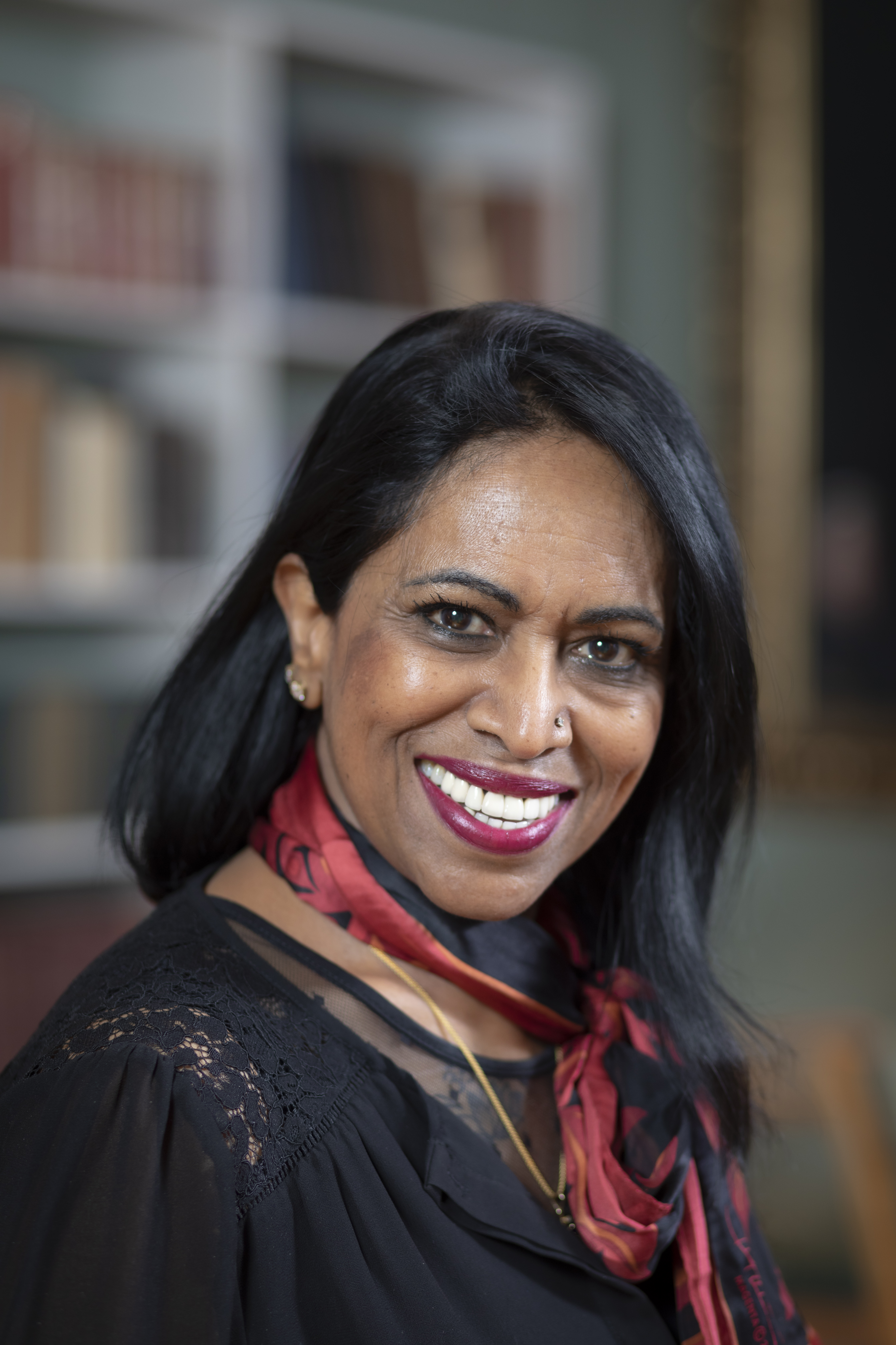 Trondheim 12.11.2019 : NTNU utnevner nyæresdoktor. Mottagelse på Lerchendal gård. Vishanthie Sewpaul, dr.h.c.Professor Emerita in Social Work, University of KwaZulu-Natal (UKZN) i Sørafrika. Foto: Thor Nielsen / NTNU